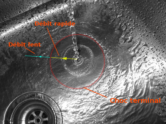 Réplication d'un choc terminal dans un évier.